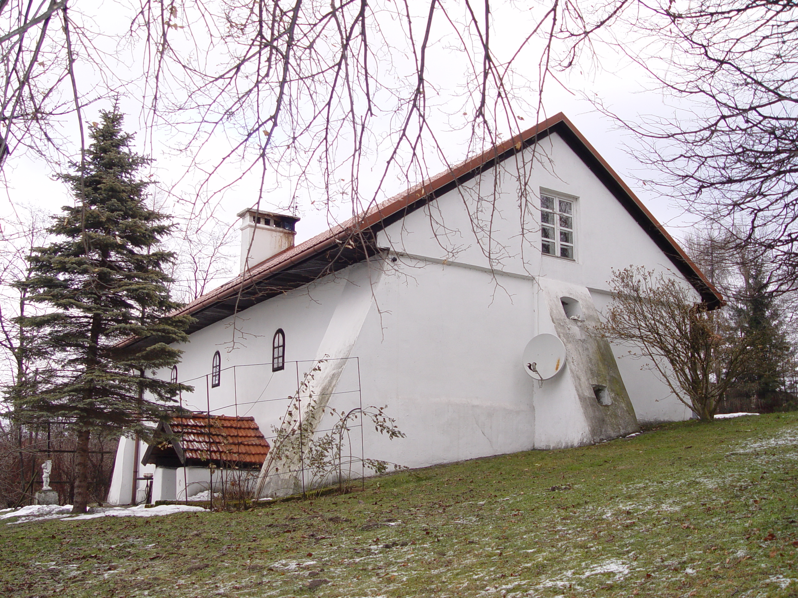 XVII-wieczny spichlerz, odrestaurowany, obecnie pracownia artystyczna